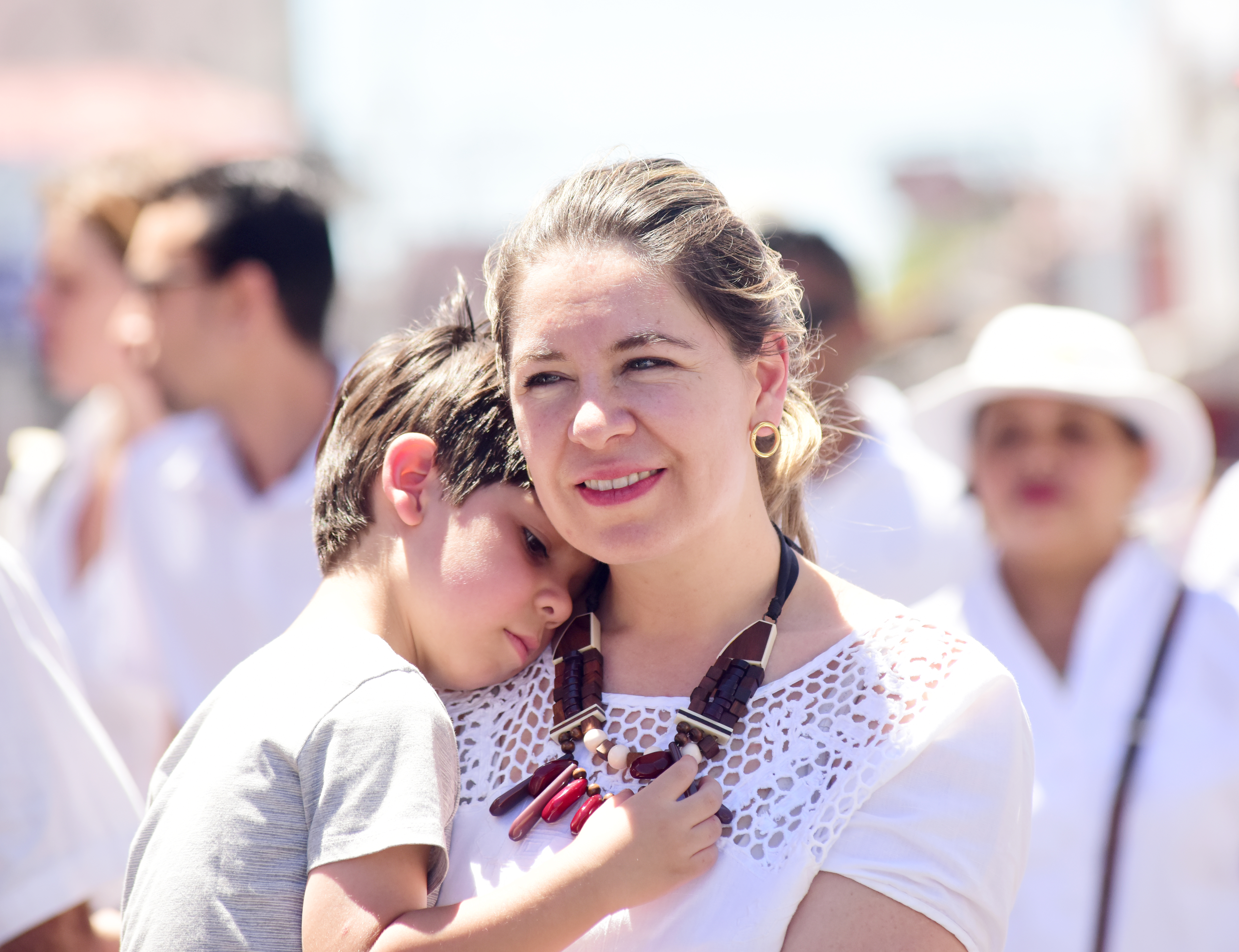 Carlos Alvarado, presidente electo de Costa Rica 2018-2022.